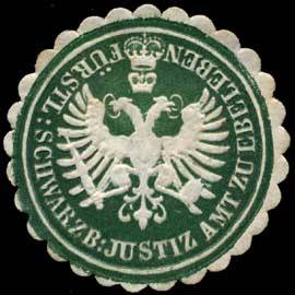 Sealing stamp Title: Fürstlich Schwarzburger Justiz Amt zu Ebeleben Description: Place: Ebeleben size: 3 cm